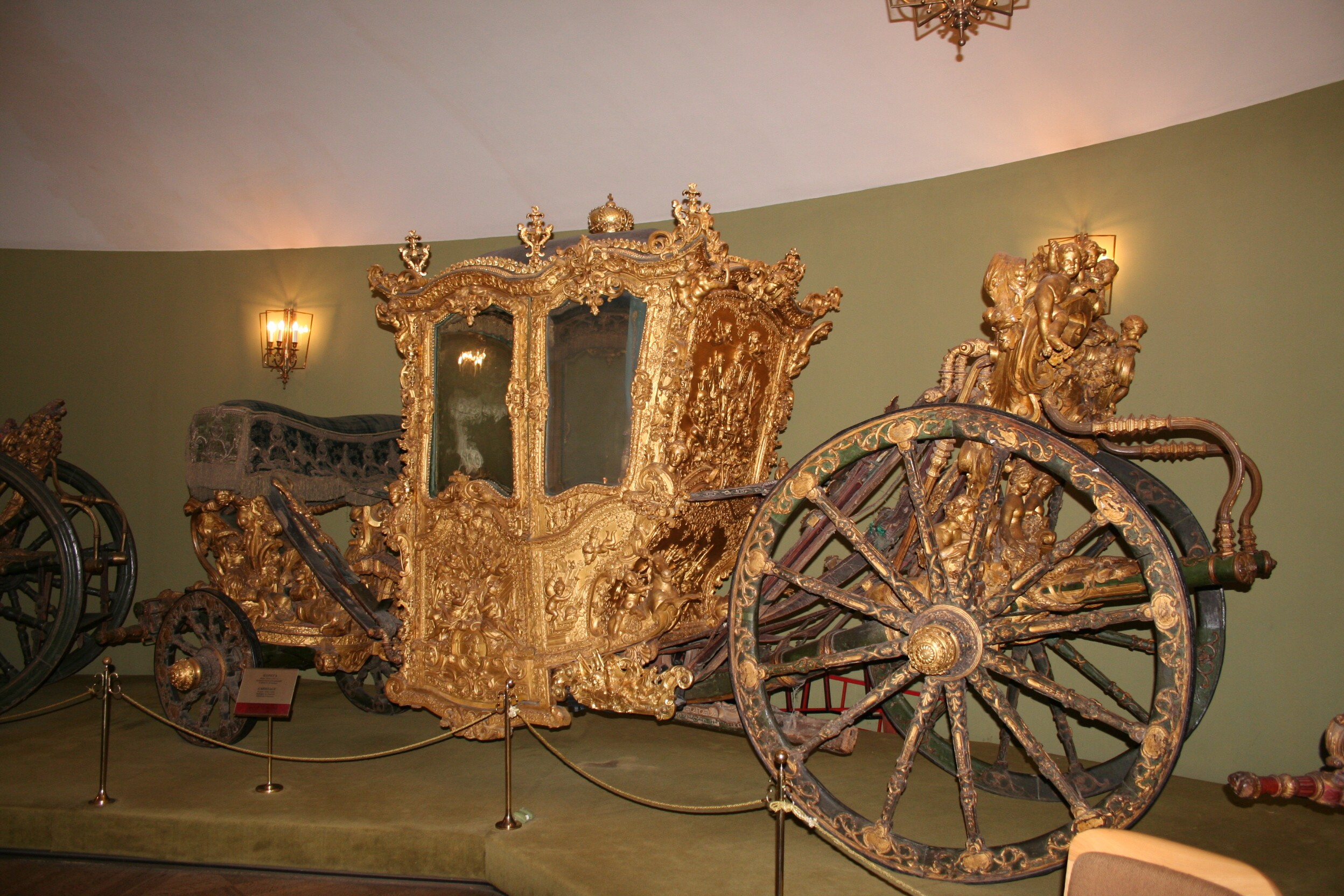 Museo de la Armería estatal, Oruzbeynaya palata, en el Kremlin. Carruaje